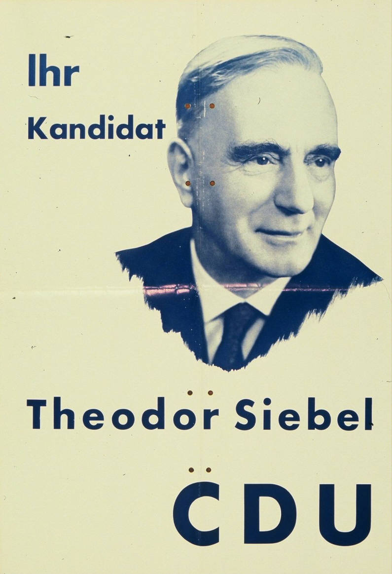 Ihr Kandidat Abbildung: Porträtfoto Kommentar: Plakat aus Siegen Plakatart: Kandidaten-/Personenplakat mit Porträt Objekt-Signatur: 10-001: 1081 Bestand: Plakate zu Bundestagswahlen (10-001) GliederungBestand10-18: Plakate zu Bundestagswahlen (10-001) » Die 4. Bundestagswahl am 17. September 1961 » CDU » Mit Porträtfoto Lizenz: KAS/ACDP 10-001: 1081 CC-BY-SA 3.0 DE